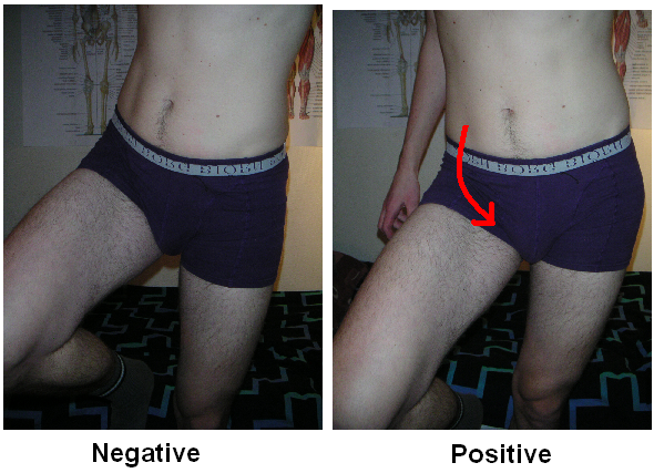 Demonstration of Trendelenburg's sign